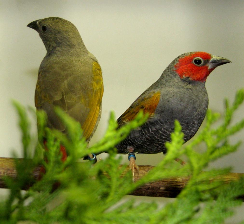 Rotmaskenastrilde, fotografiert auf der Vogelausstellung 2011 in Bochum